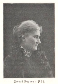 Everilda von Pütz geb. von Klenze (1843-1926), deutsche Adelige und Schriftstellerin